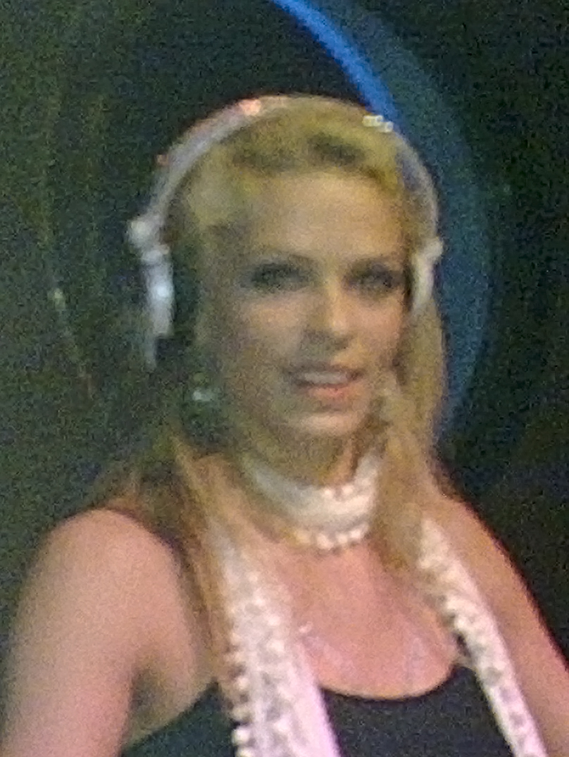 Disc jockey Niki Belucci.